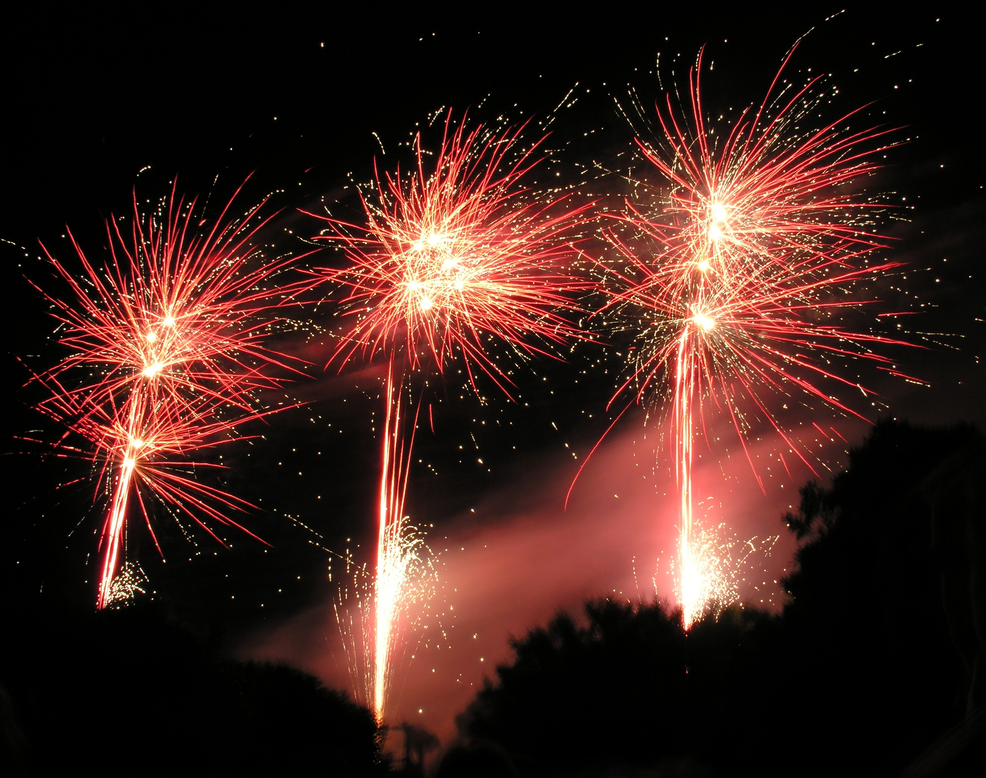 self made. 31 de Xullo de 2005 - Campus universitario, Santiago de Compostela